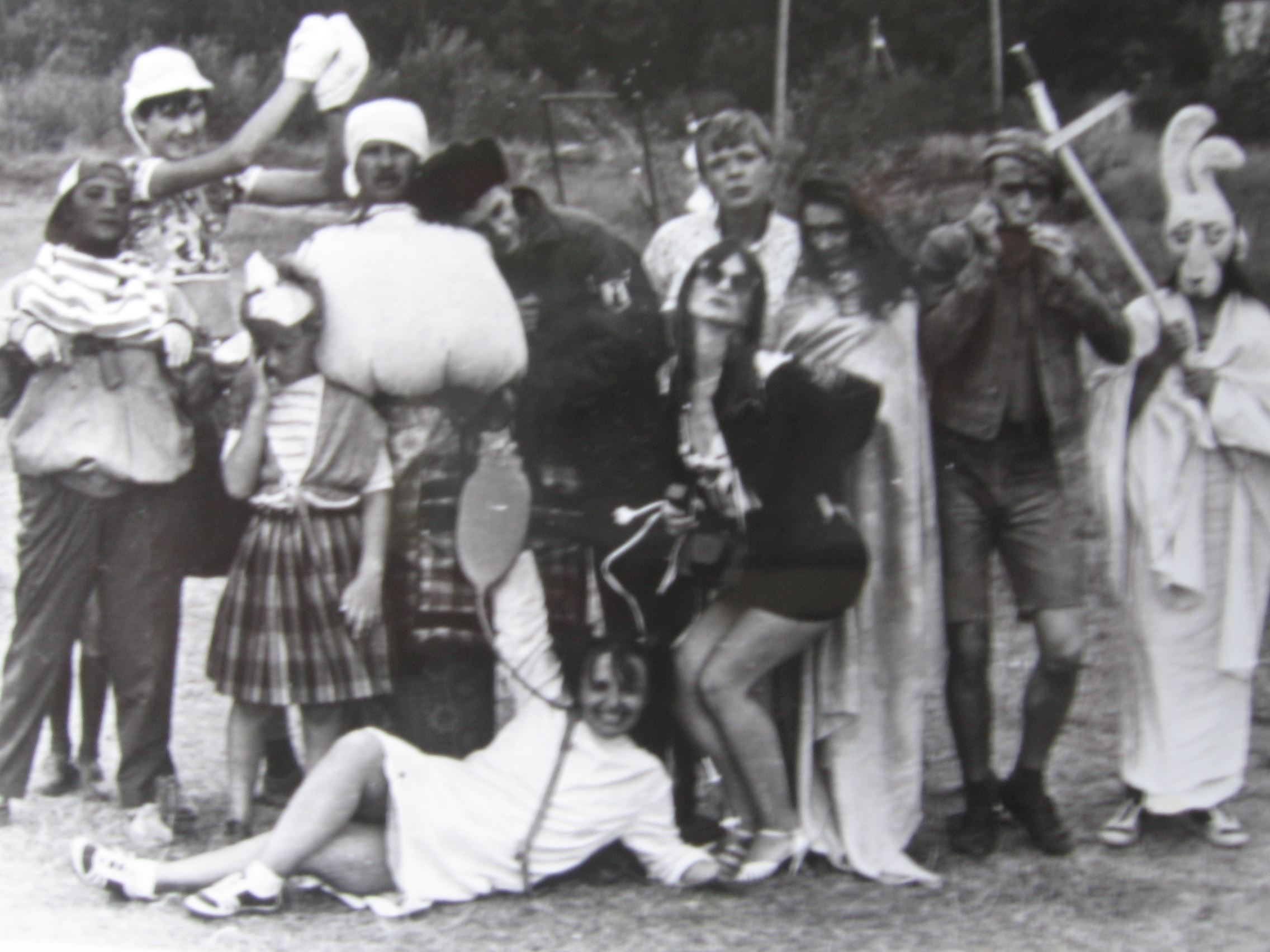 Беларуская (тарашкевіца): Дзень жарту, 1992